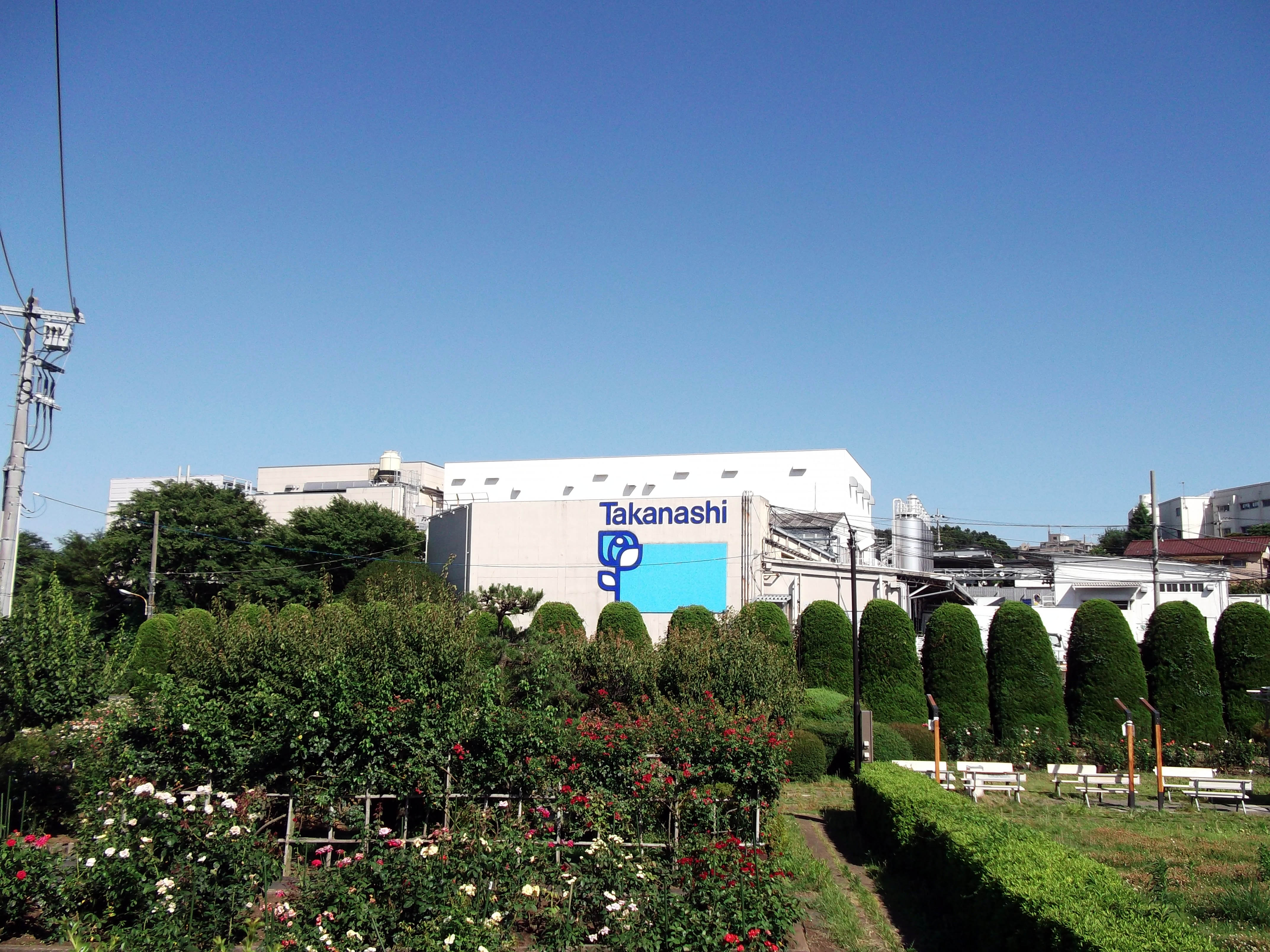 タカナシ乳業本社工場。横浜市旭区本 (ほん)宿町 (じゅくちょう)5番地。